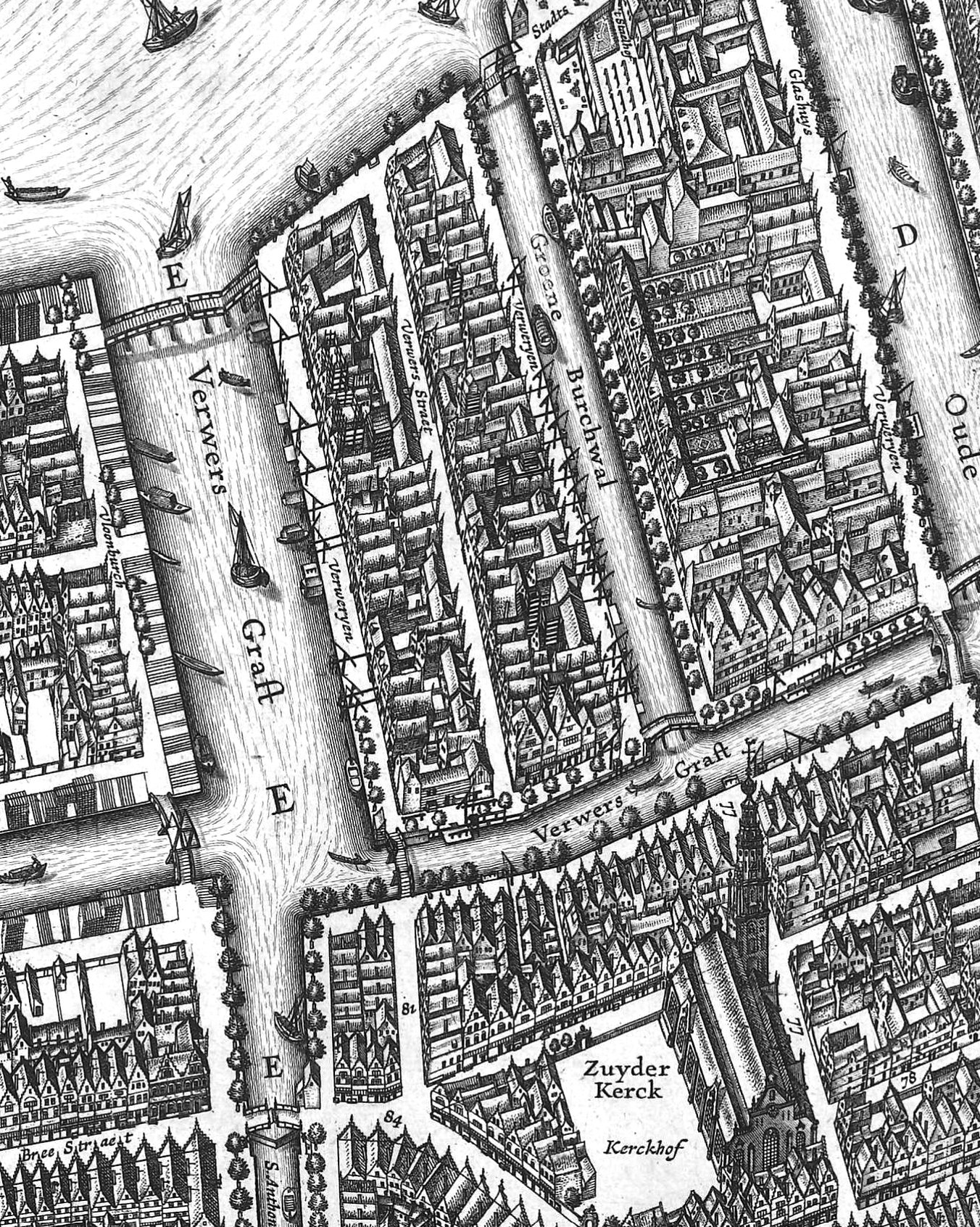 Uitsnede uit een kaart van Amsterdam rond de Verwersgraft (Raamgracht), Groene Burchwal en de Zuyderkerck 1625